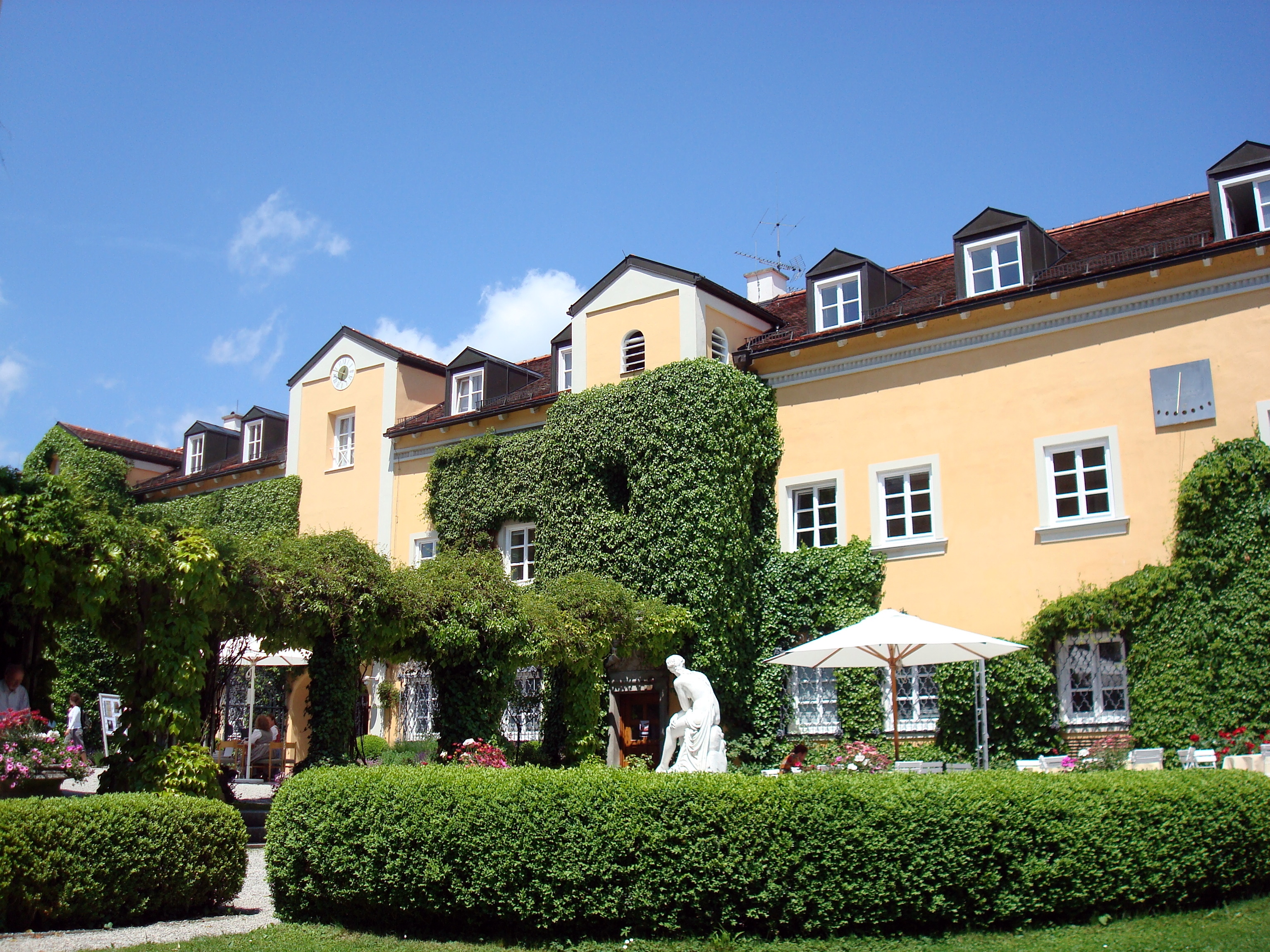 Tutzing, Schloss Tutzing, Südseite des Kavalier- und Wirtschaftsbaus.